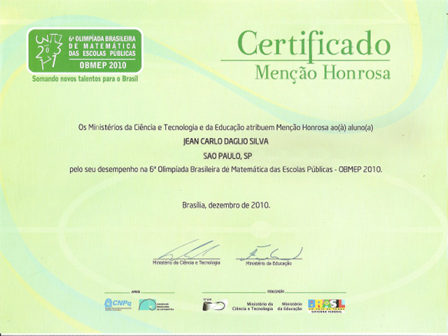 Certificado